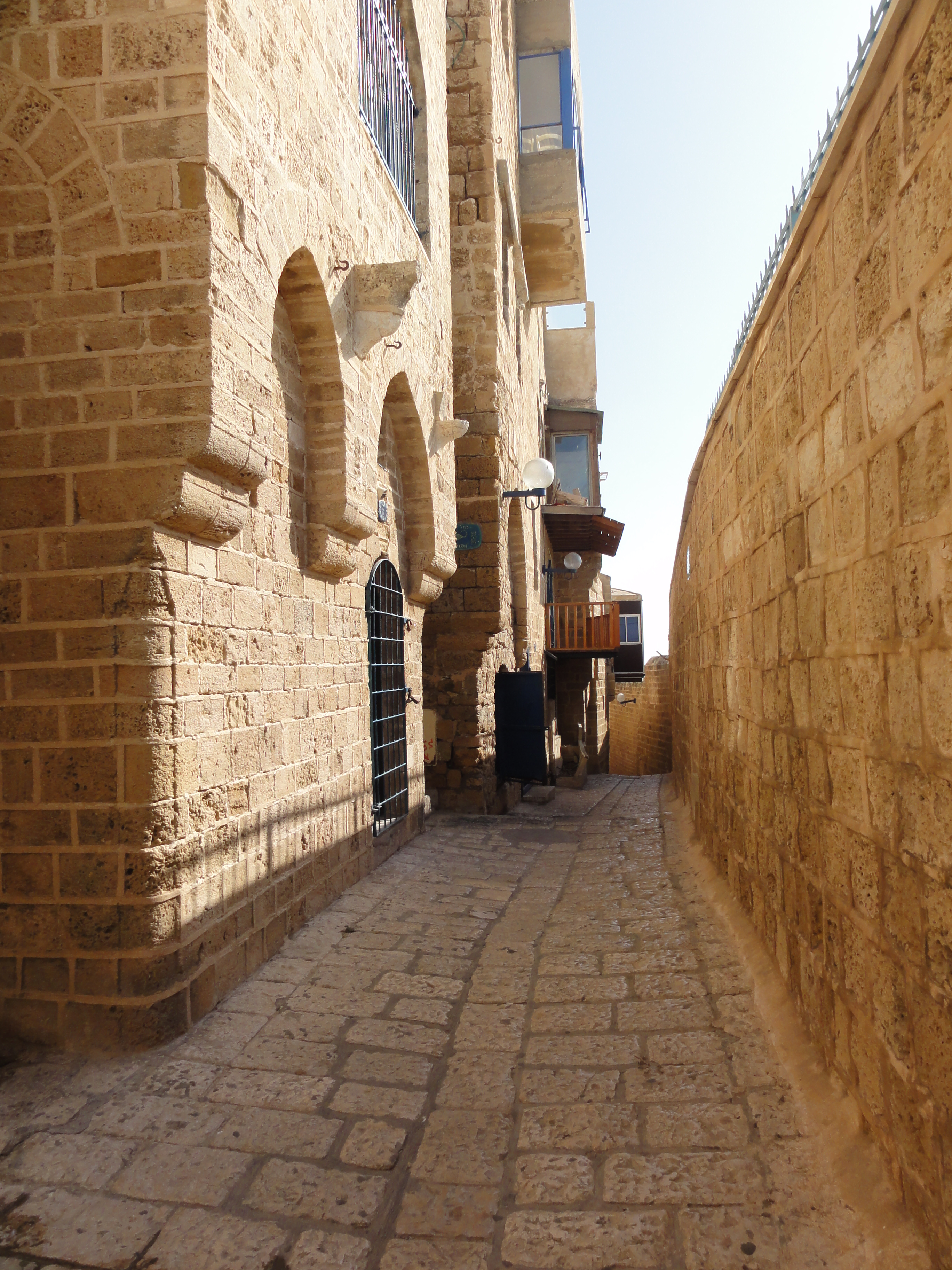 Jaffa, Israel